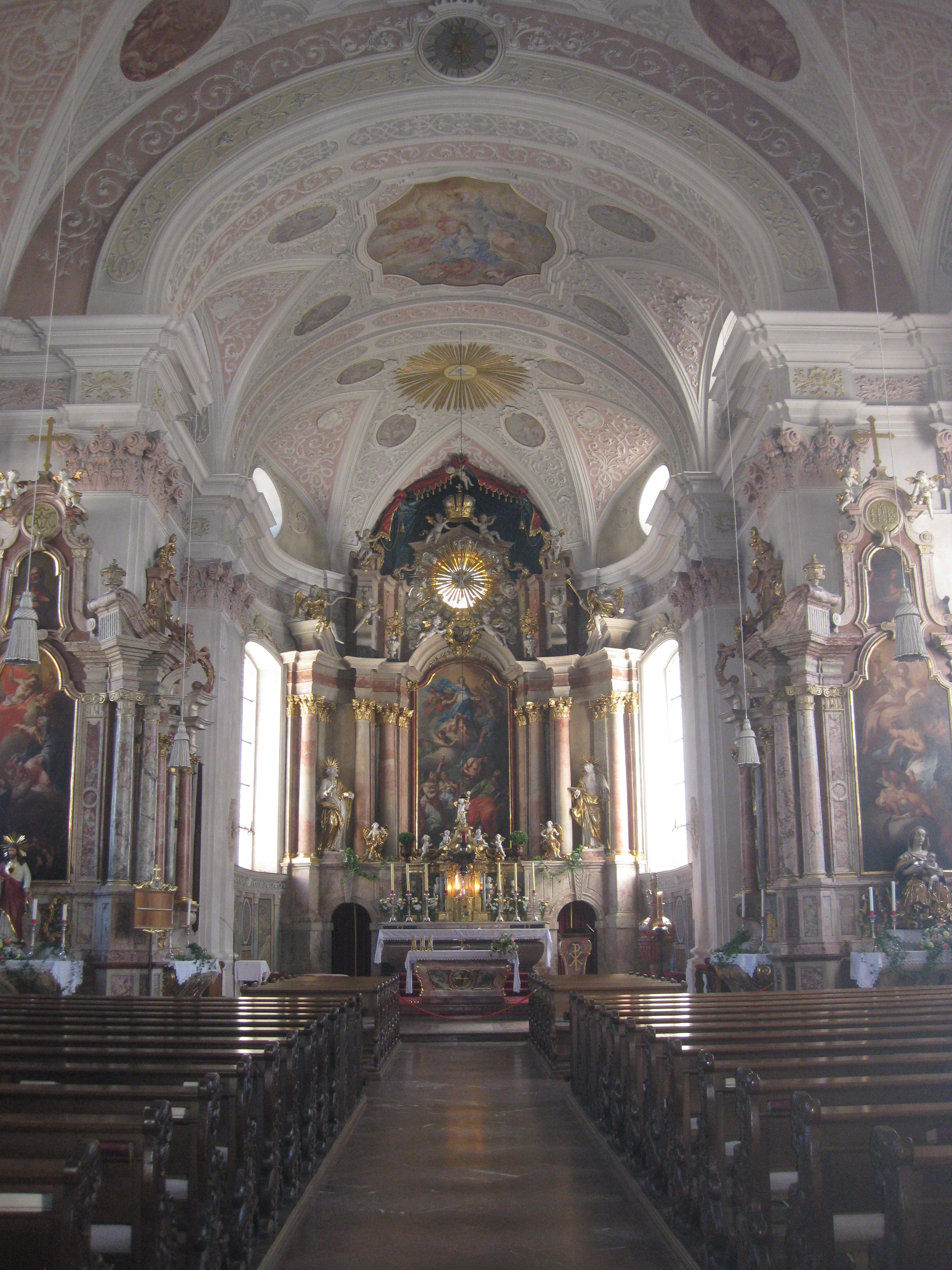 Dekanatspfarrkirche innen